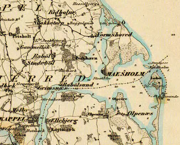 Dateil fra Generalstabens Kaart over Slesvig, 1858